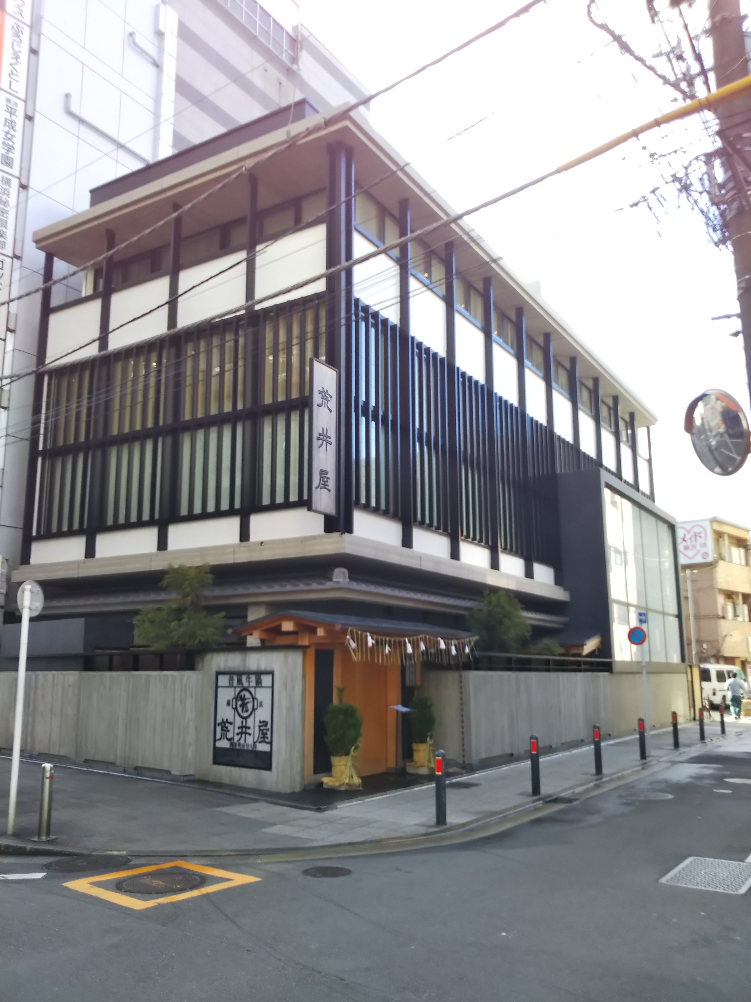 横浜市中区曙町、牛鍋の老舗荒井屋本店